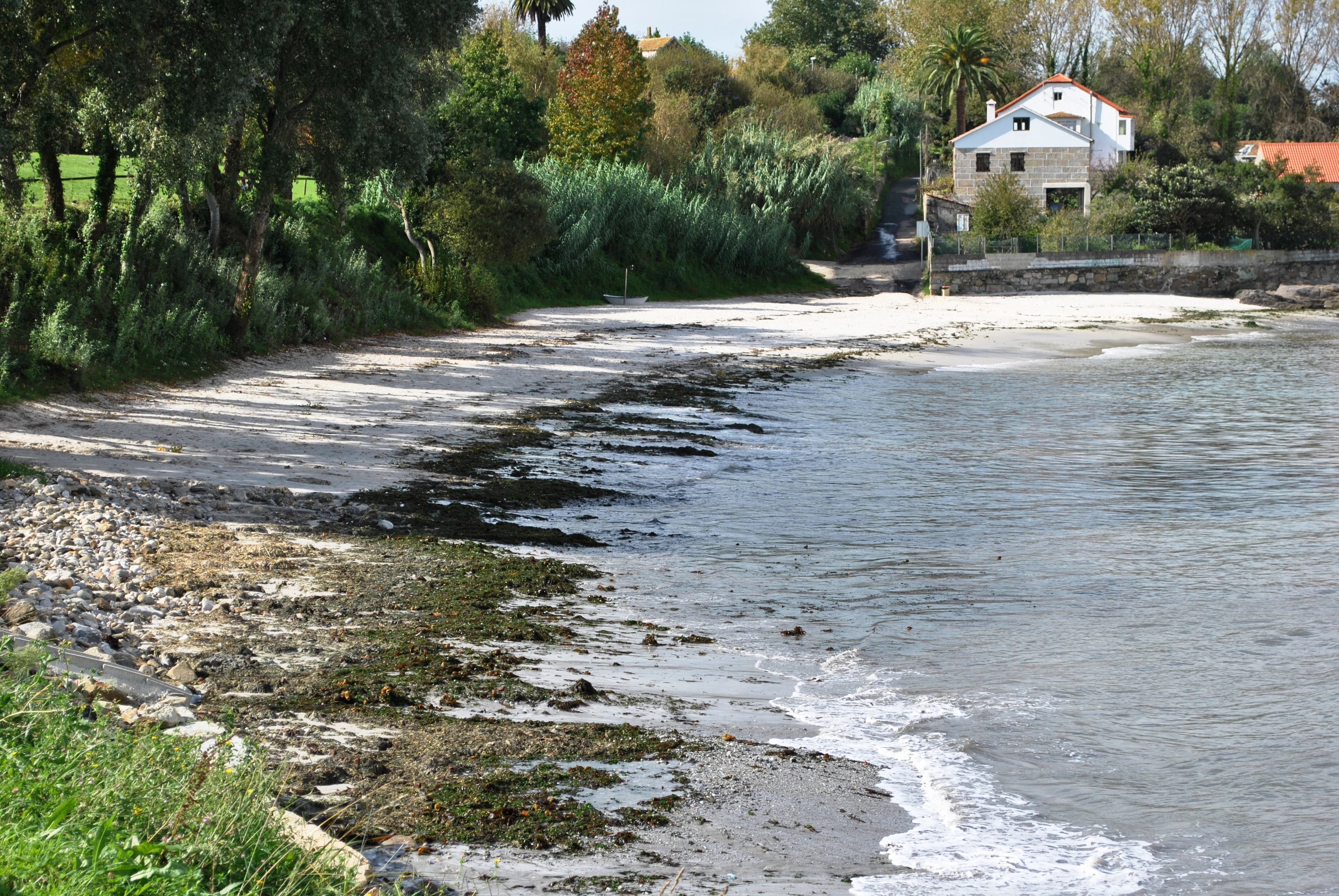 Véxase o título e as categorías.